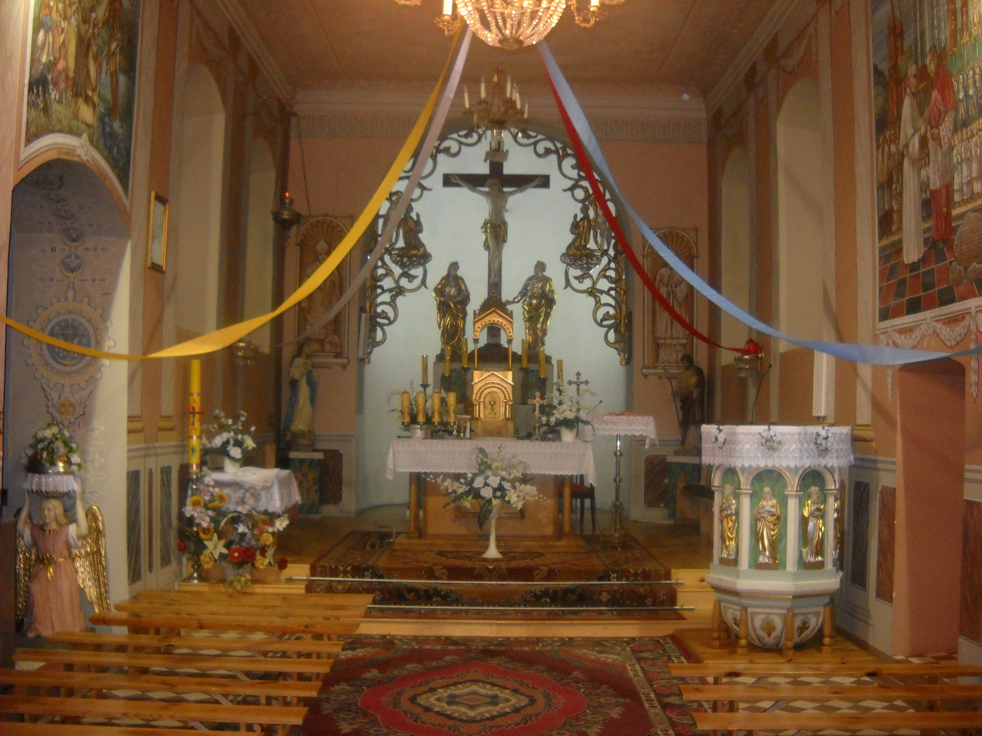 Widok na wnętrze Kościoła